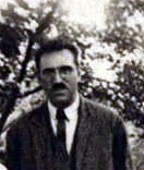 Adolf Velhartický (Pestrý týden 1928)